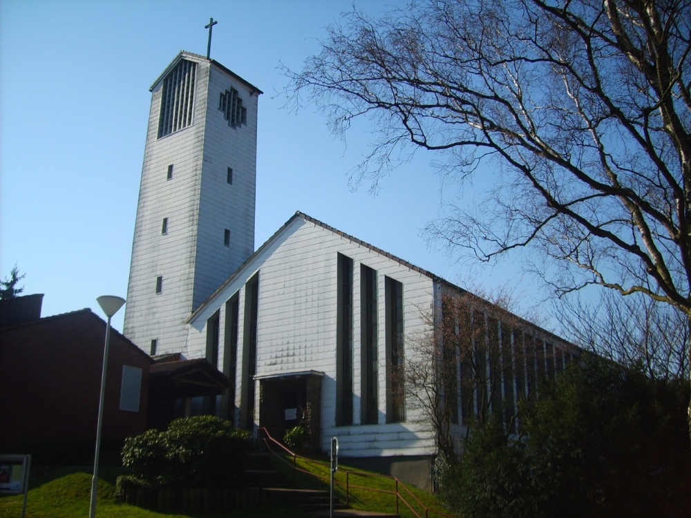 Kirche auf dem Bremkamp, Wuppertal-Vohwinkel, Germany